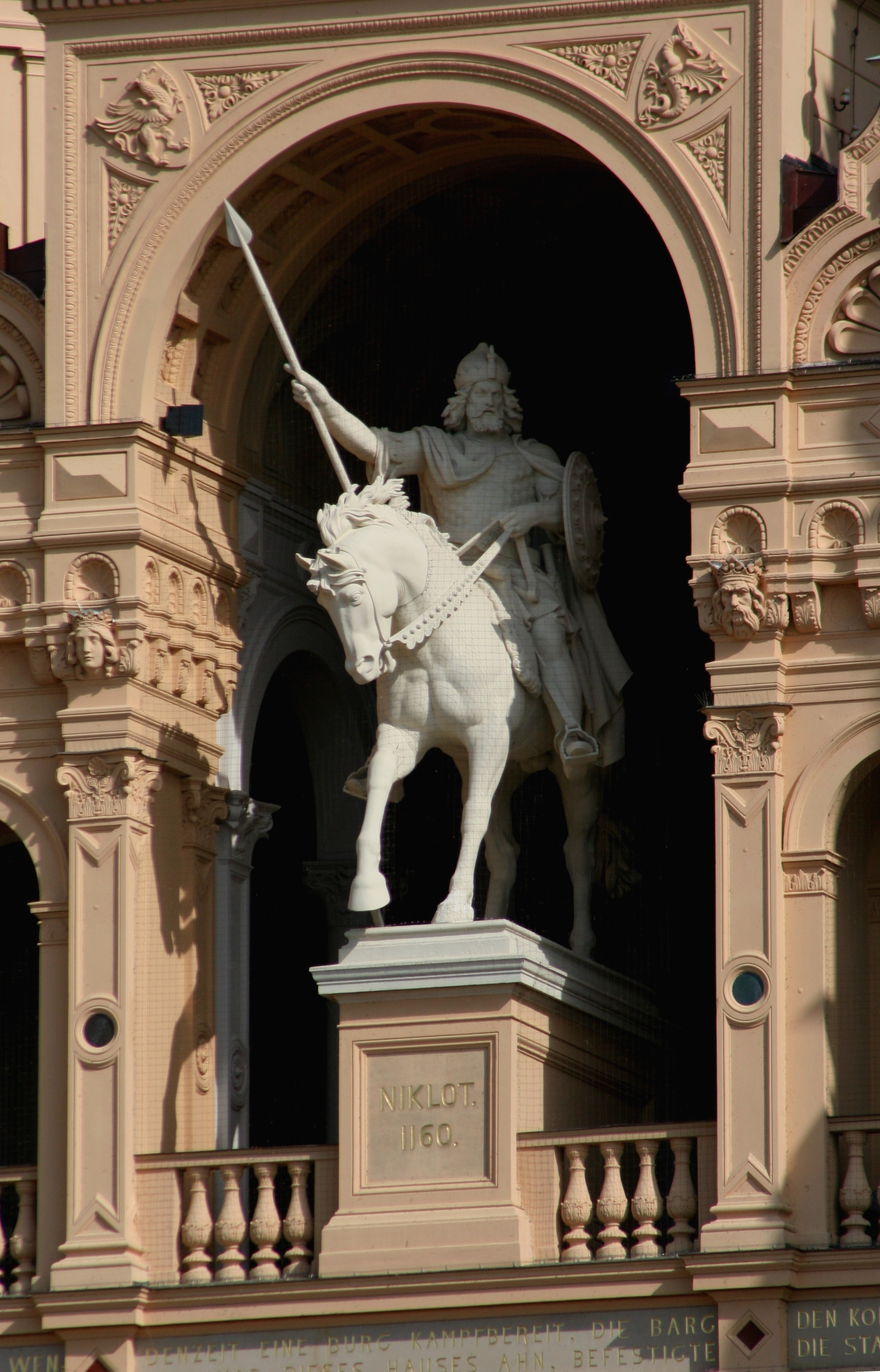 Reiterstandbild Fürst Niklot I, Schweriner Schloss